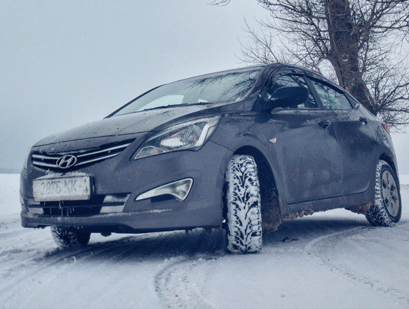 машина